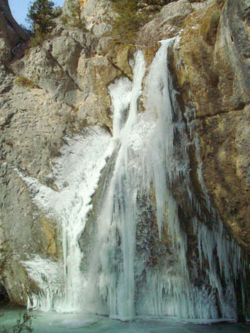 Paisaje del Monumento Natural de La Fuentona